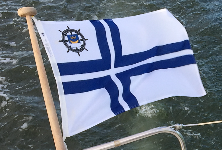 Helsingin Navigaatioseuran lippu